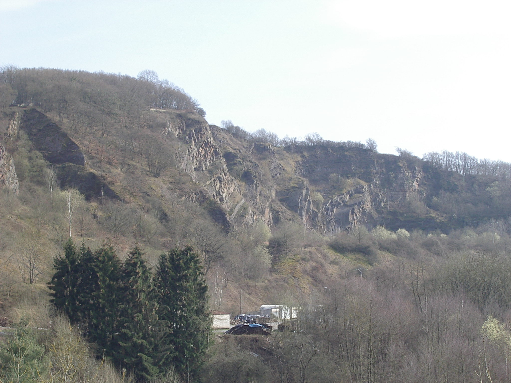 Mont Vireux est un site archéologique situé sur la rive gauche de la Meuse qui surplombe la ville de Vireux-Molhain